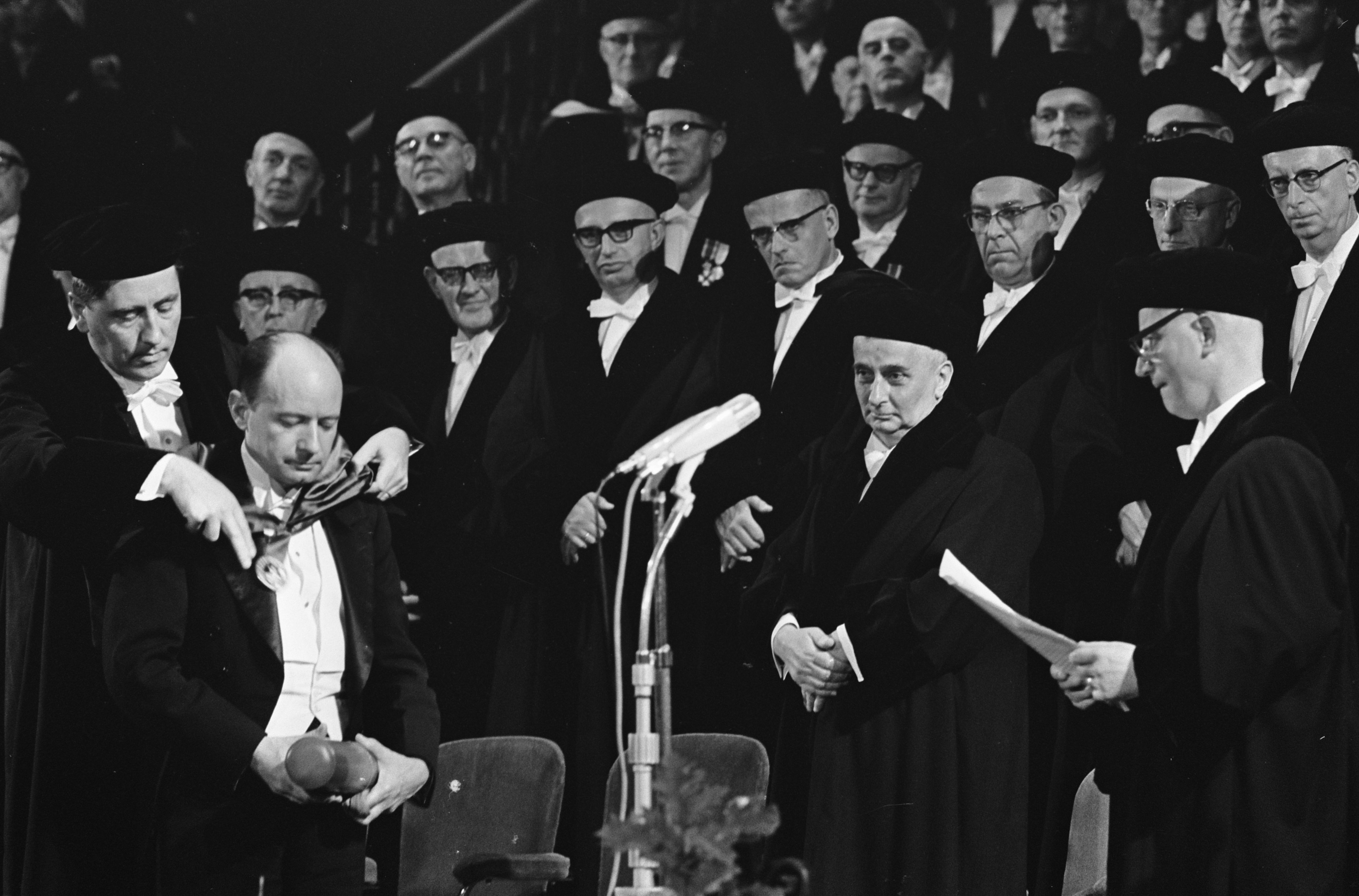 Collectie / Archief : Fotocollectie Anefo Reportage / Serie : Uitreiking eredoctoraten van de Vrije Universiteit in het Concertgebouw te Amsterdam Beschrijving : Pr. dr. J. Ellul, hoogleraar aan de universiteit van Bordeaux en ontvanger van een eredoctoraat in de rechtsgeleerdheid, met bul en cappa Datum : 20 oktober 1965 Locatie : Amsterdam, Noord-Holland Trefwoorden : eredoctoraten, hoogleraren, plechtigheden Persoonsnaam : Ellul, Jacques Fotograaf : Fotograaf Onbekend / Anefo Auteursrechthebbende : Nationaal Archief Materiaalsoort : Negatief (zwart/wit) Nummer archiefinventaris : bekijk toegang 2.24.01.05 Bestanddeelnummer : 918-3391